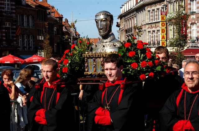 Grande Procession de Tournai - Chef-reliquaire de saint Piat (premier martyr de Tournai) Auteur : Bernard Libert